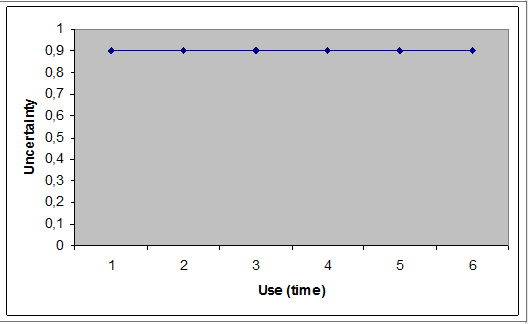 Монгол: 5